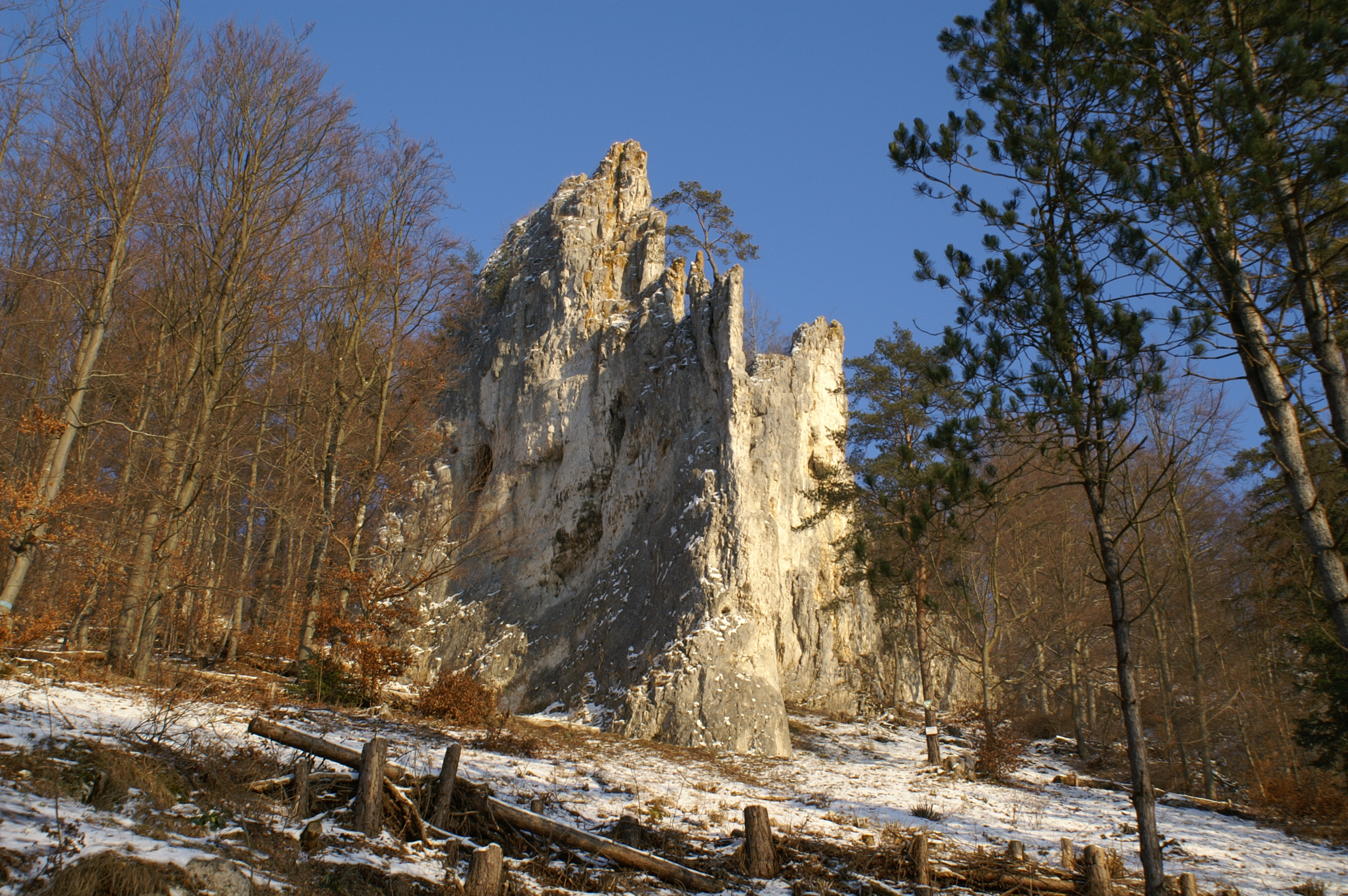 Bruckfels im Achtal bei Blaubeuren